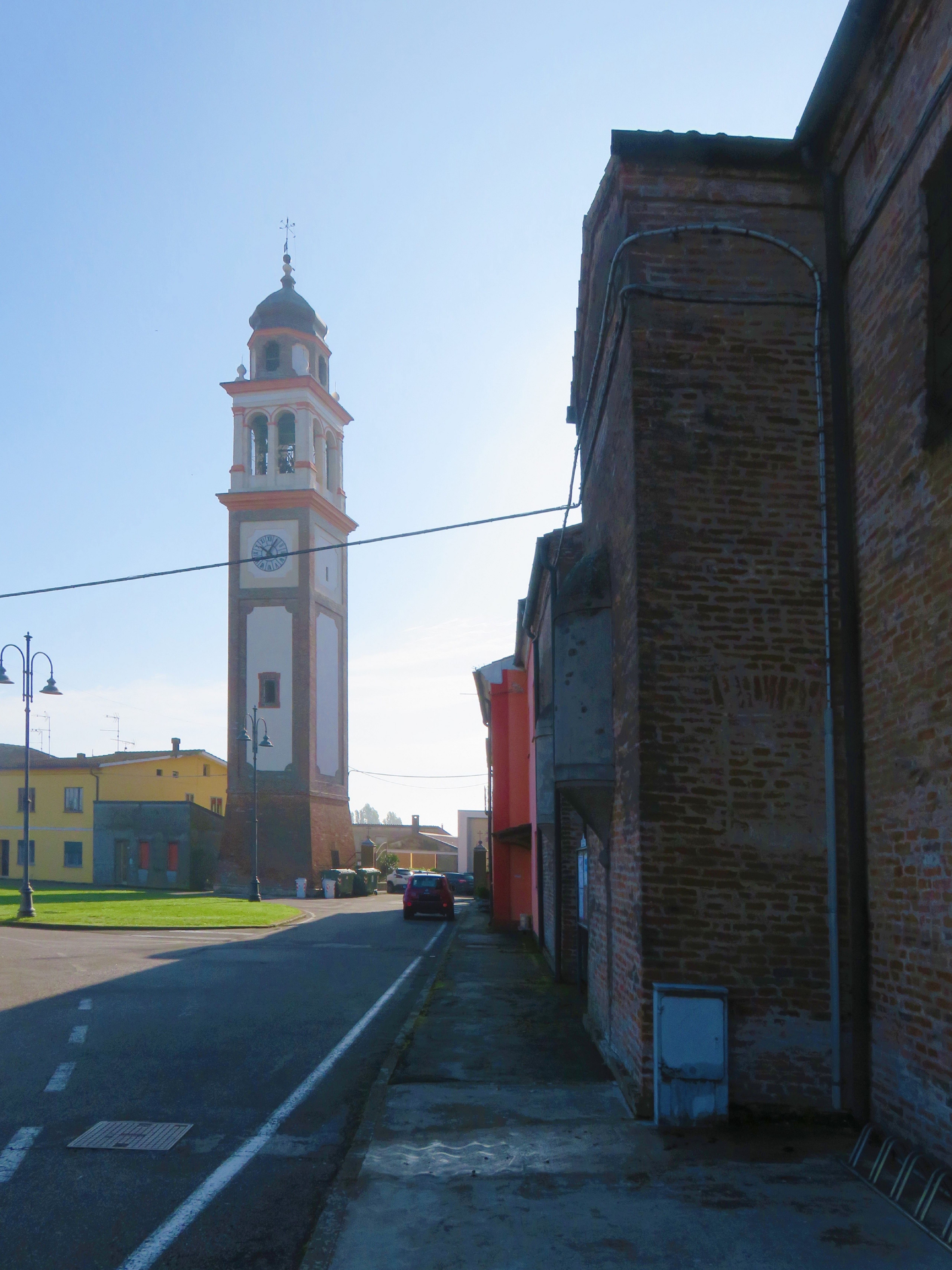 Esterno dell'edificio.